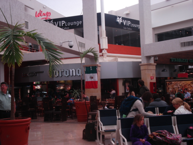 Aeropuerto Internacional de Los Cabos